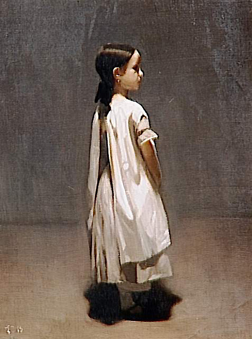 La petite sœur de l’artiste